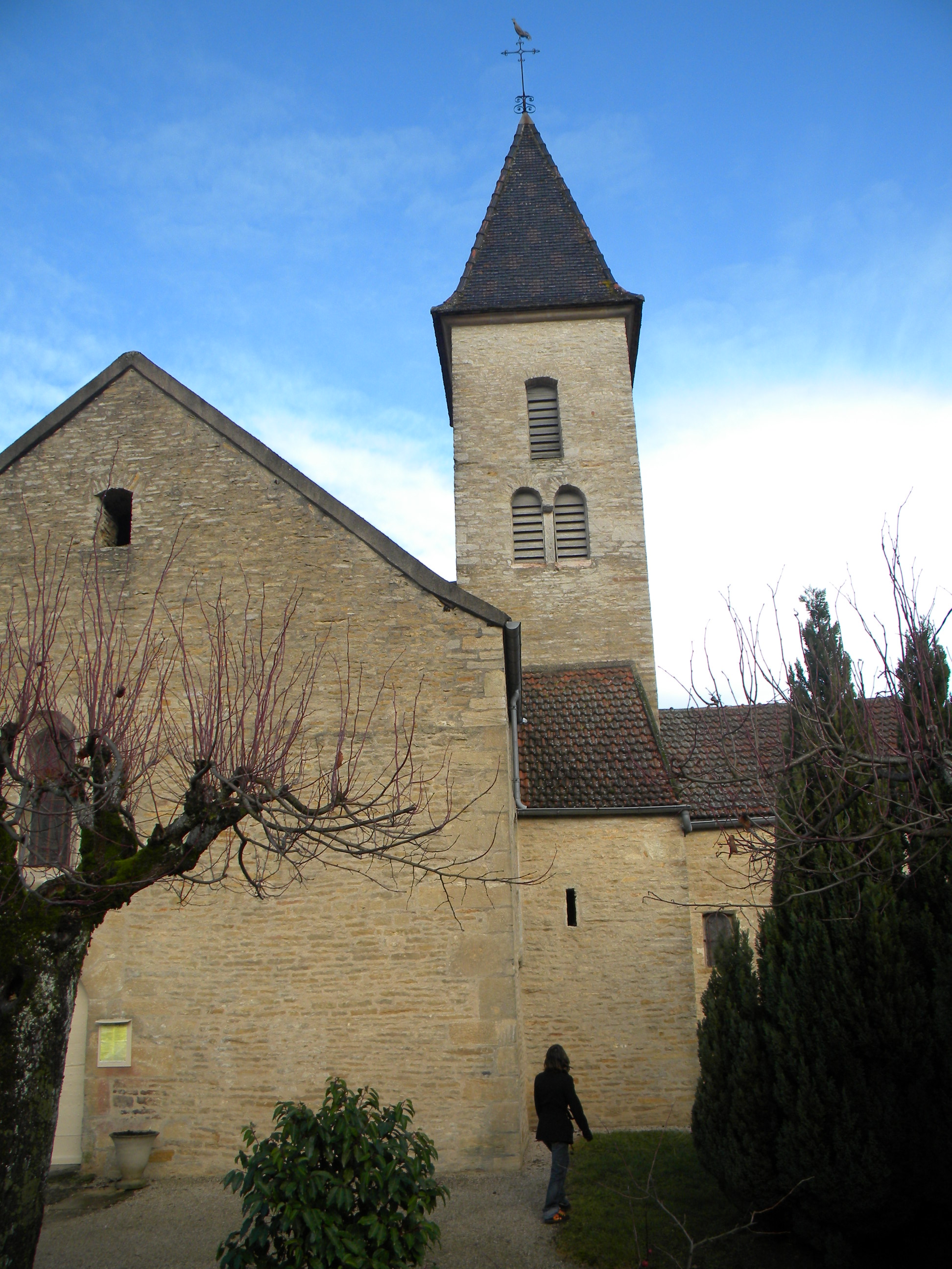 Kirko de Echevronne